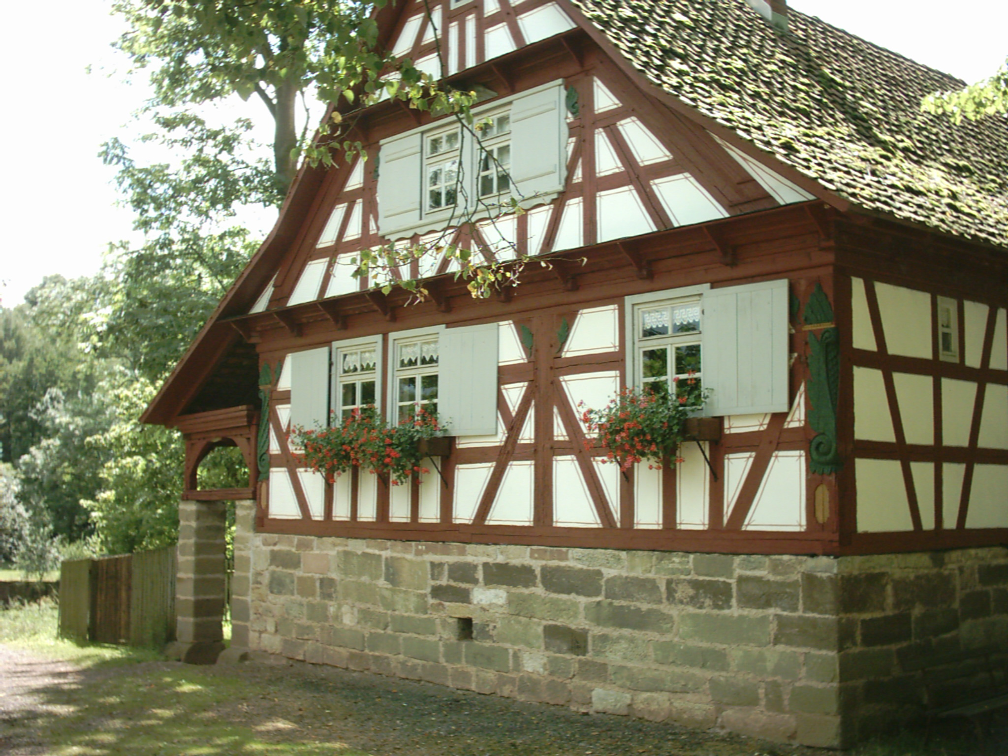 Altes Bauernhaus im Hennebergischen Museum Kloster Veßra Fotograf: presse03, selbst fotografiert 2005 Lizenz: GNU-FDL